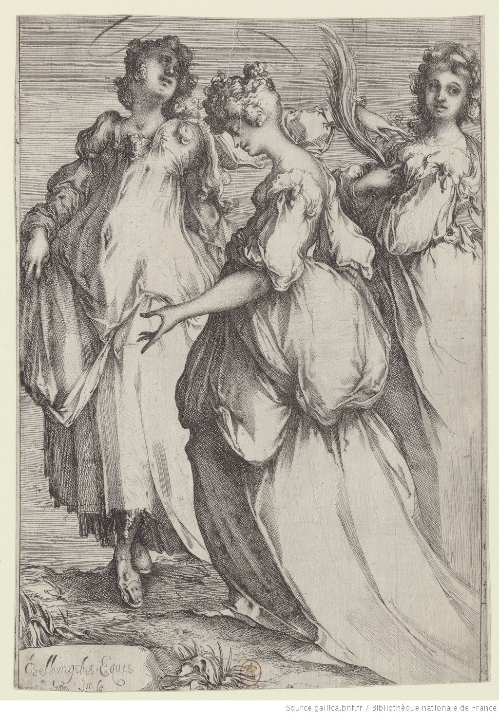 Les trois saintes ; estampe de Bellange, Jacques (1575?-1616). Graveur